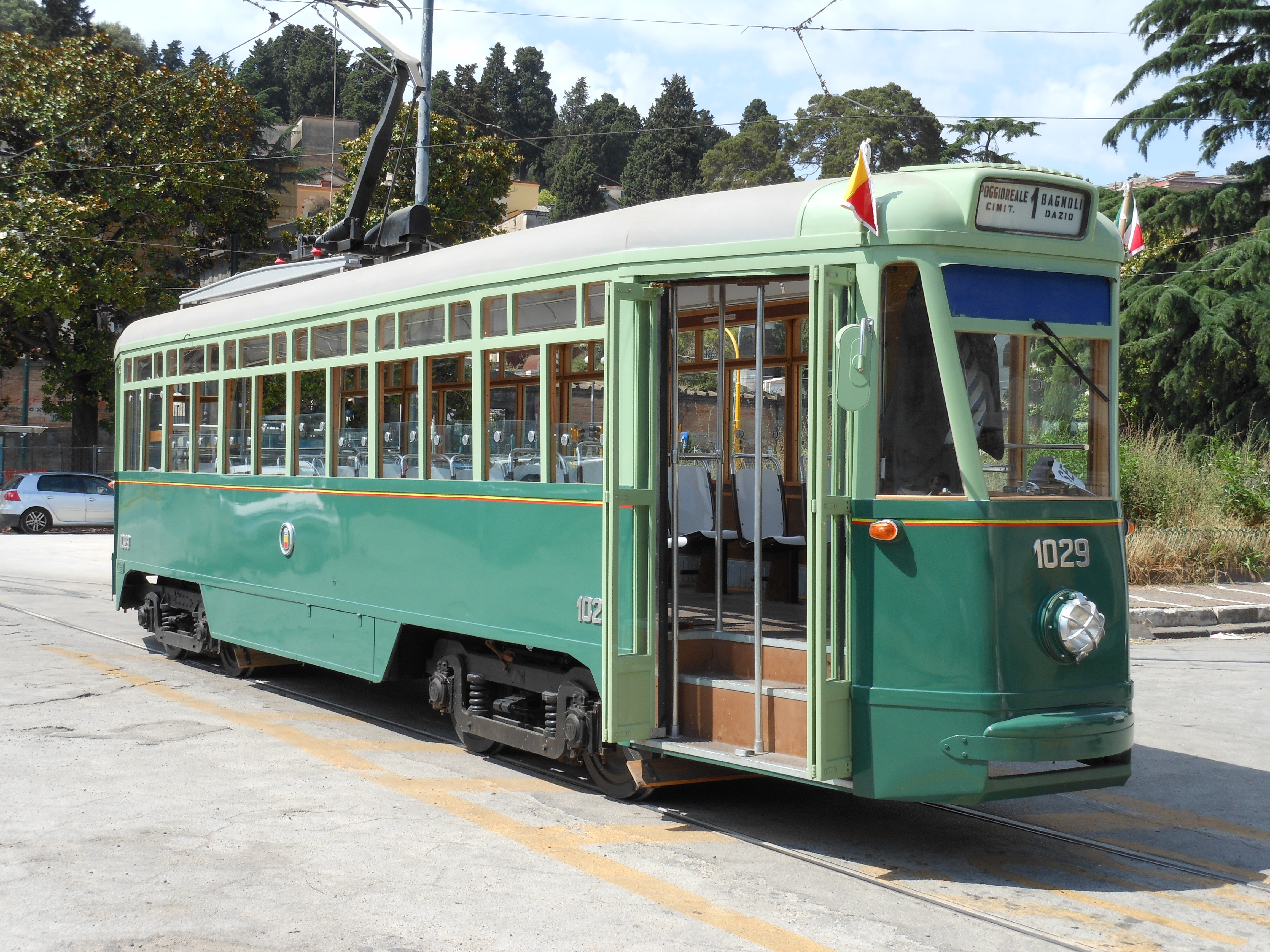 La vettura tranviaria Ct139K tipo Meridionale 1029, dopo il restauro, all'emiciclo Poggioreale